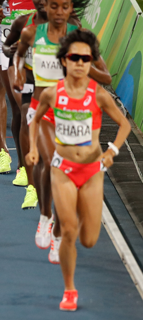 Rio de Janeiro - A queniana Vivian Jepkemoi Cheruiyot vence final e bate recorde olímpico dos 5 mil metros nos Jogos Rio 2016, no Estádio Olímpico (Fernando Frazão/Agência Brasil)